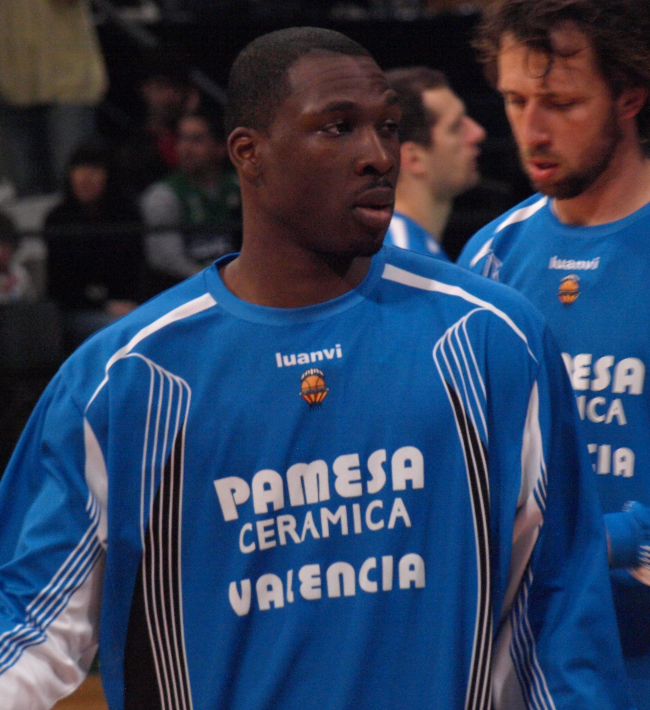 Florent Pietrus en el partido que enfrentó a su equipo, el Pamesa Valencia, al DKV Joventut de liga ACB en el Pabellón Olímpico de Badalona en abril de 2009.